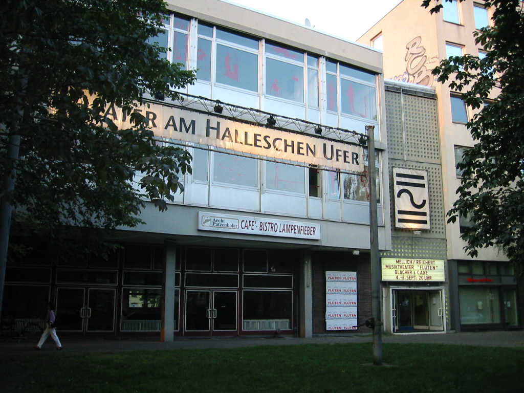 Theater am Halleschen Ufer (ehemalige Schaubühne am Halleschen Ufer, späteres HAU 2)